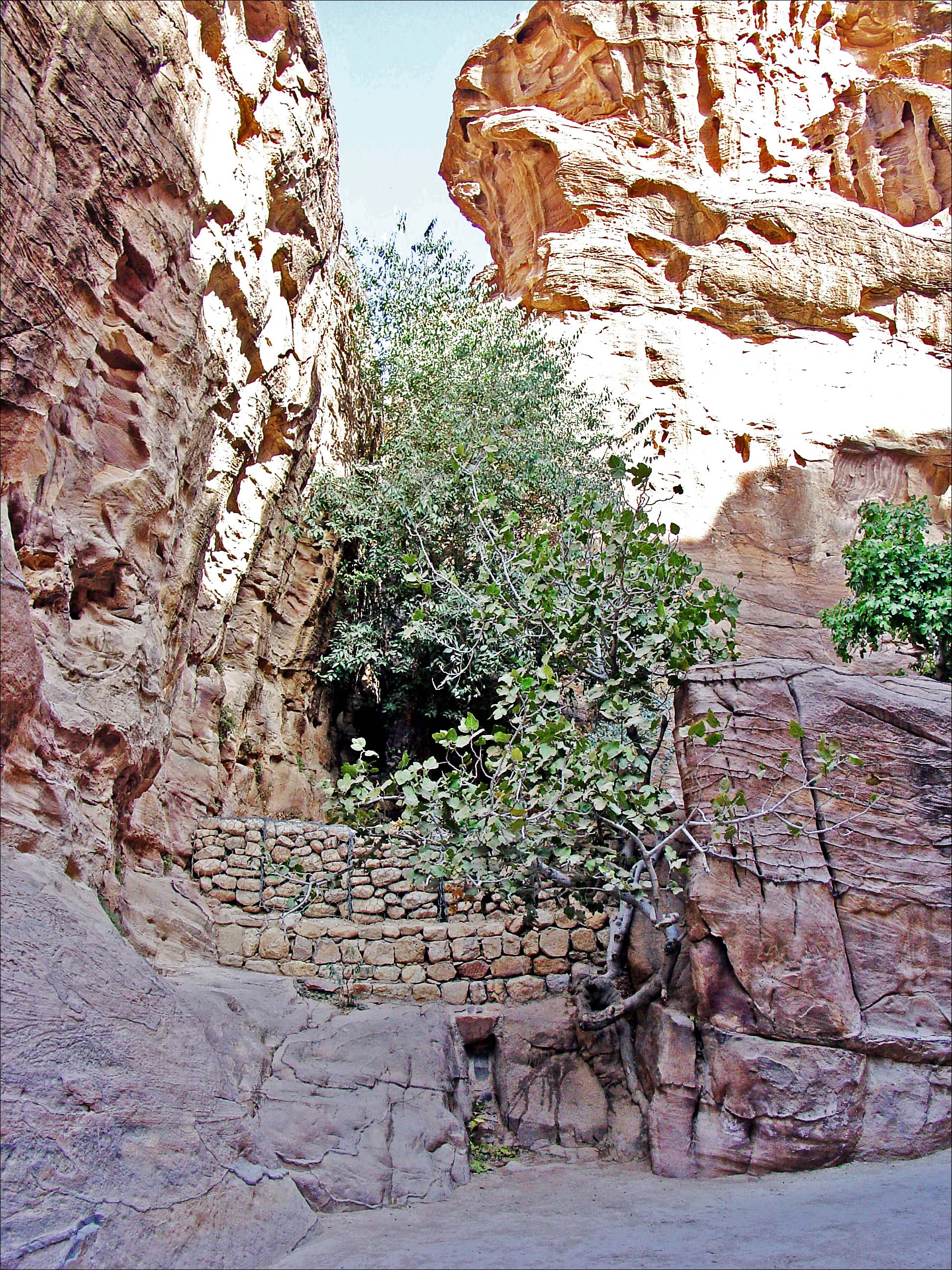 Le barrage arboré en bas du wadi